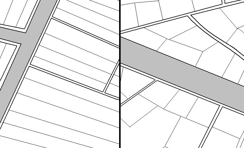 Représentation hypothétique de champs de basse Mésopotamie antique selon les propositions de Mario Liverani ; gauche : champs «sumériens» ; droite : champs «akkadiens». adapté de M. Liverani, « Reconstructing the Rural Landscape of the Ancient Near East », in Journal of the Economic and Social History of the Orient 39, 1996, p. 19